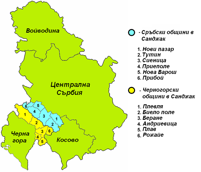 Карта на Санджак на териториите на Сърбия и Черна гора